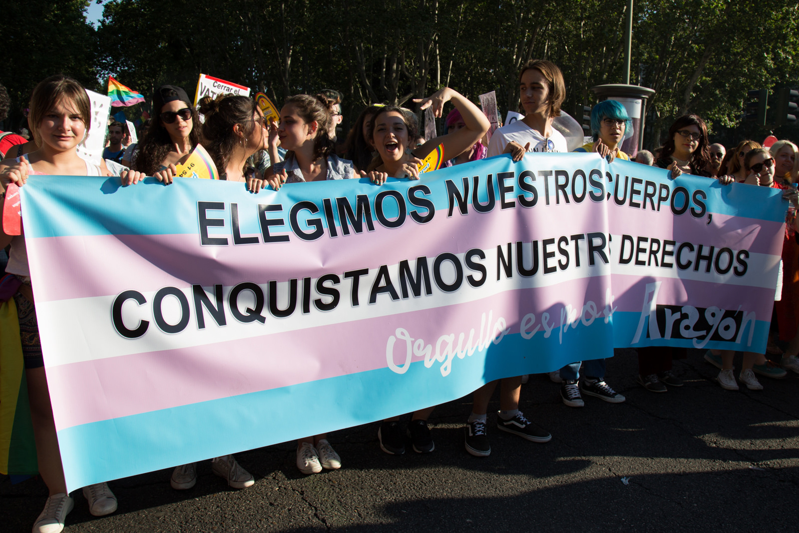 Madrid Gay Pride 2016 - Bisexual pride